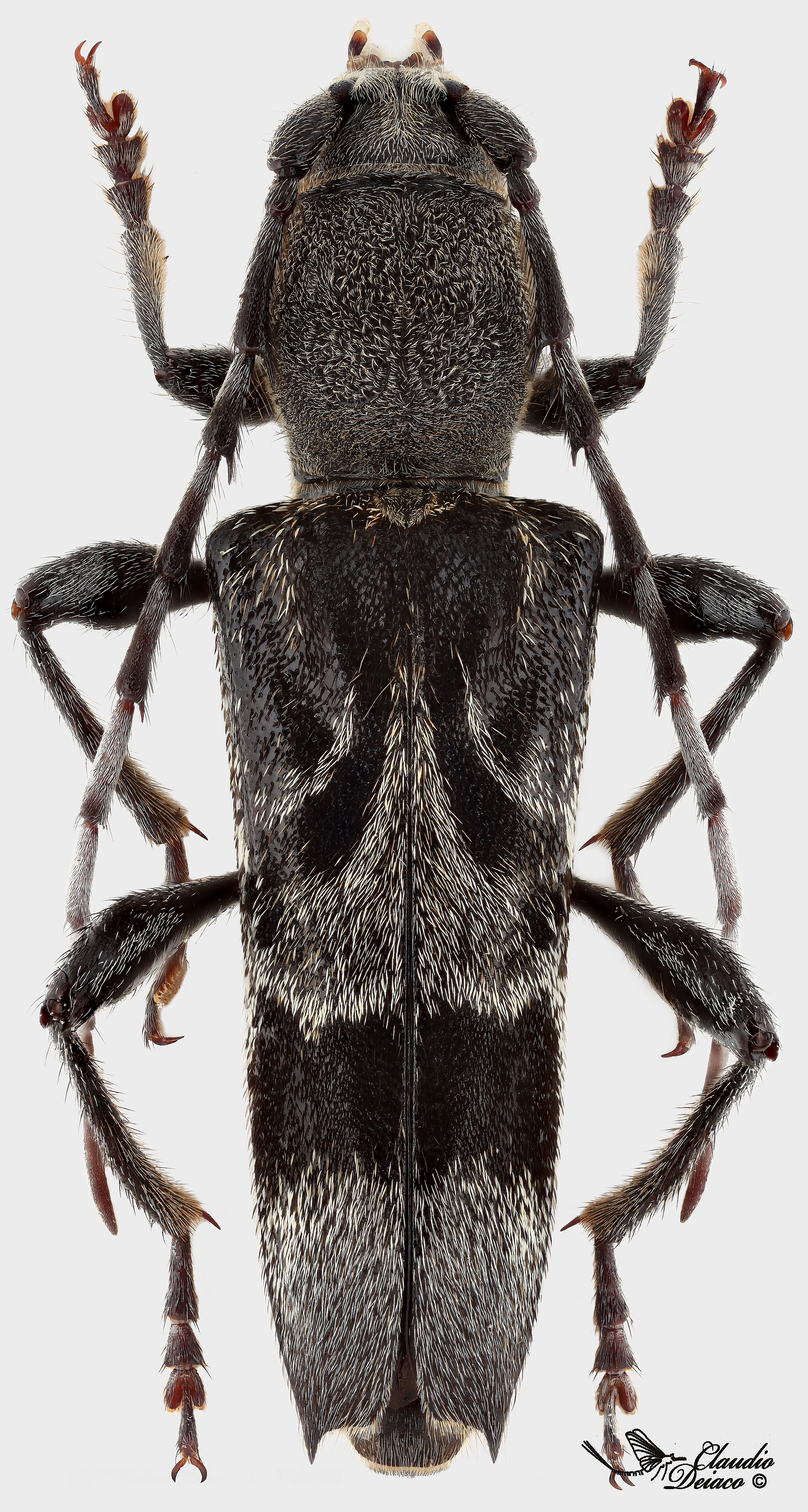 Anaglyptus gibbosus